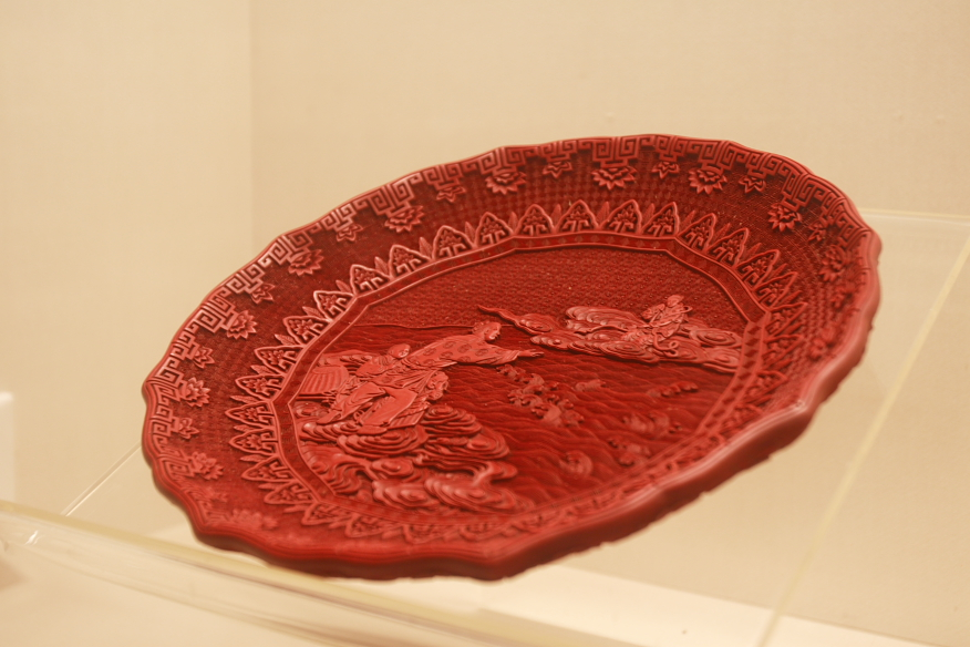 雕漆，牛郎织女纹盒，清朝文物，藏于zh:南京博物院